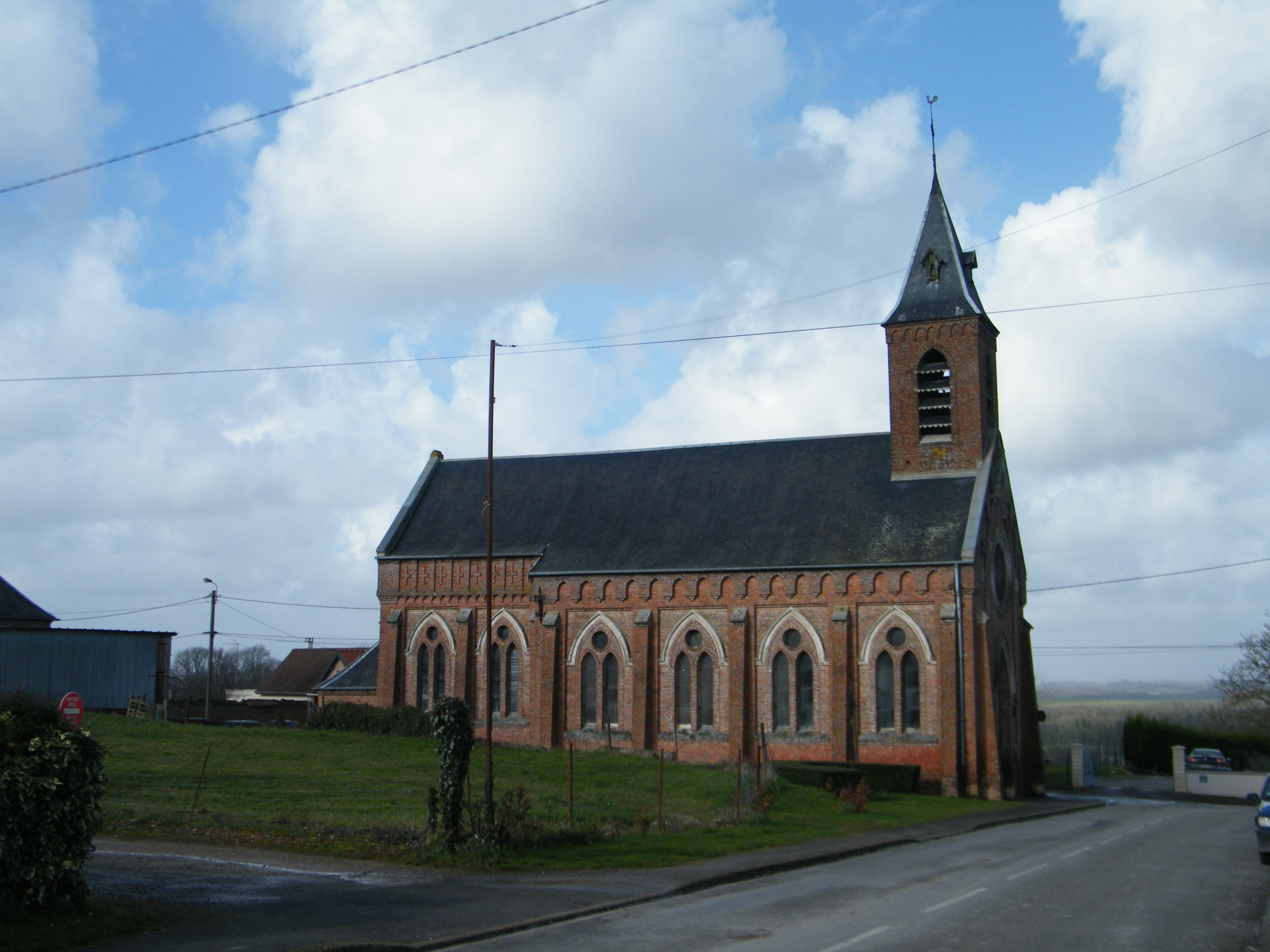 L'église Saint-Michel à Yaucourt-Bussus, Somme, France.